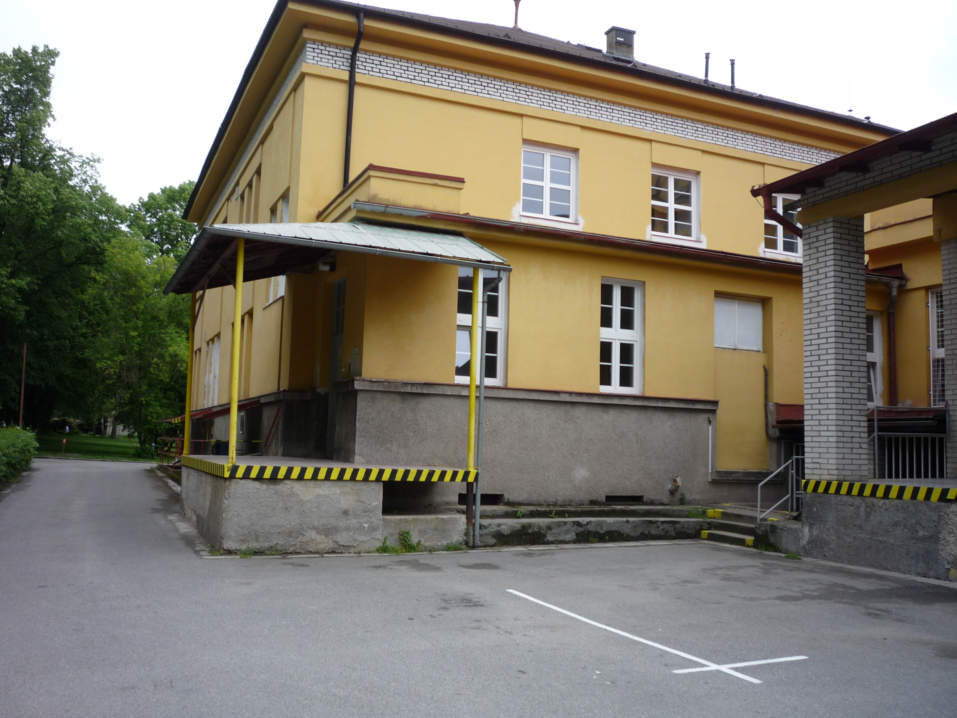 Autor fotografie Jiří Zelenka. Psychiatrická nemocnice Havlíčkův Brod - hospodářský provoz (kuchyně). Rozkošská 2322, 58023 Havlíčkův Brod. Kraj Vysočina. Czech Republik.